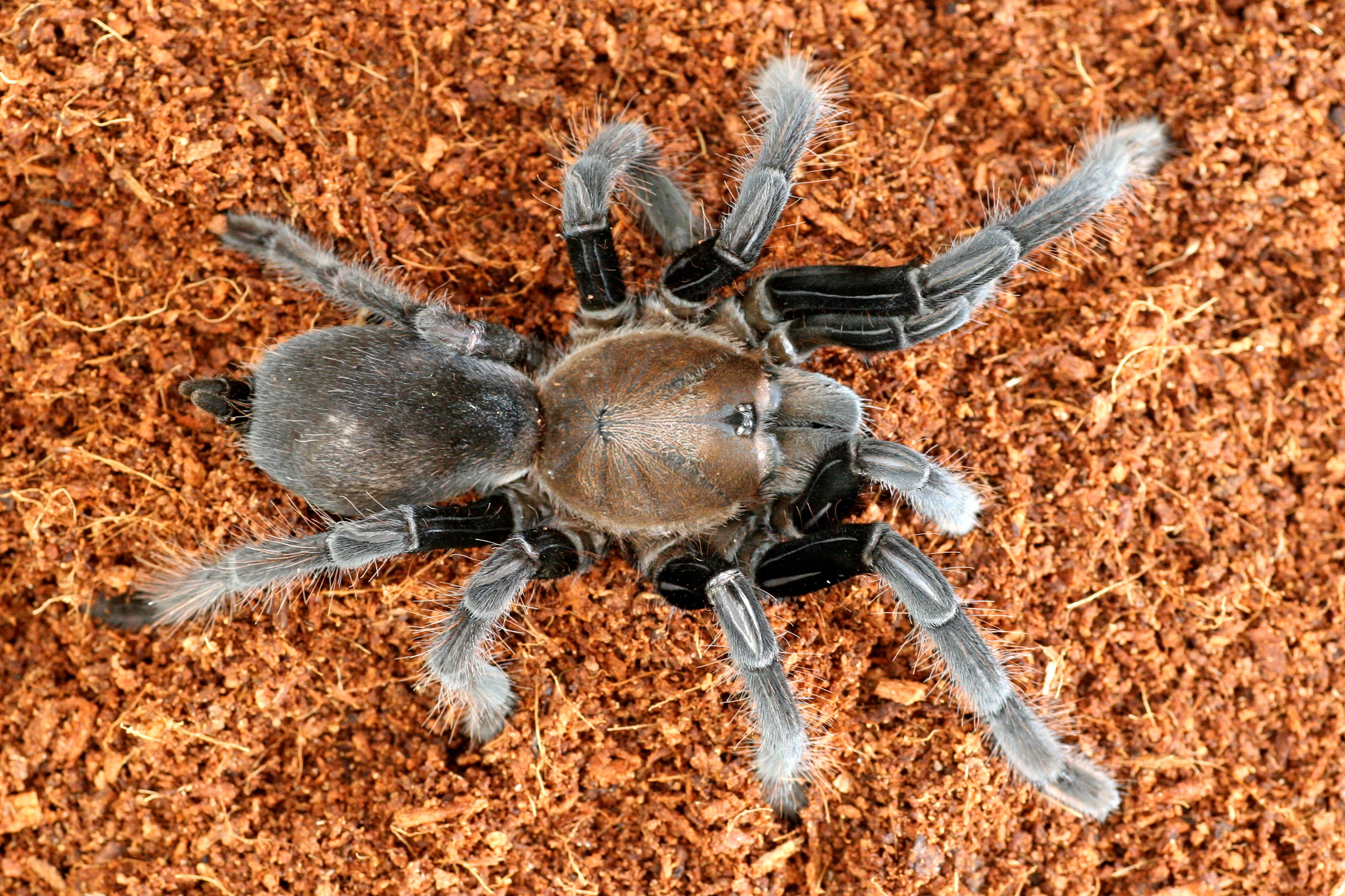 Selenocosmia barensteinerae im Terrarium